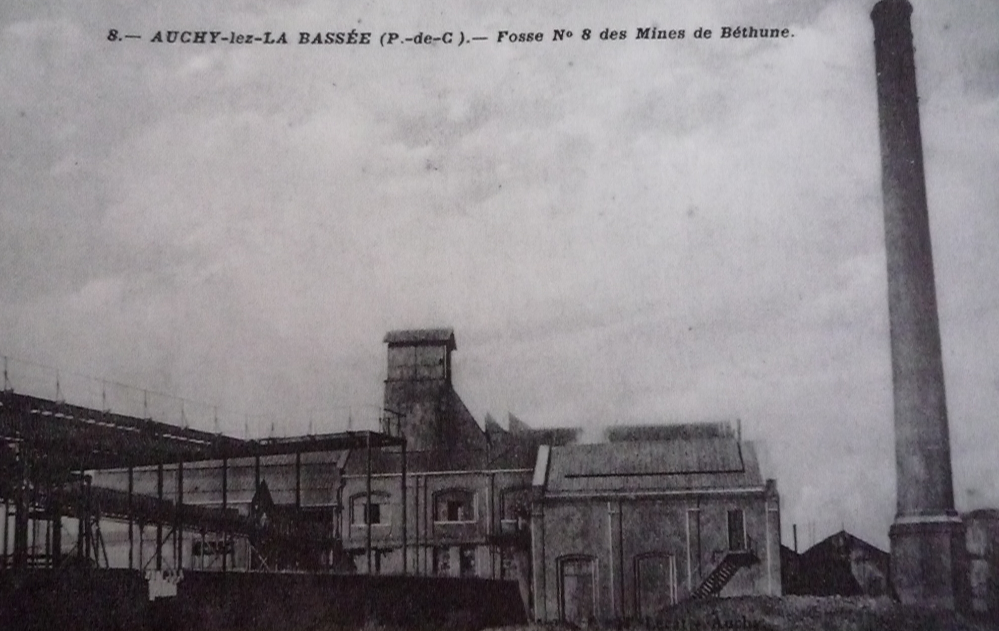 La Fosse n° 8 - 8 bis de la Compagnie des mines de Béthune était un charbonnage constitué de deux puits situé à Auchy-les-Mines, Pas-de-Calais, Nord-Pas-de-Calais, France.